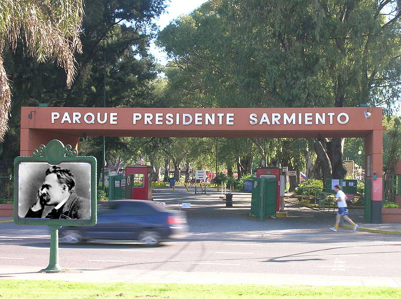 Entrada a Parque Sarmiento